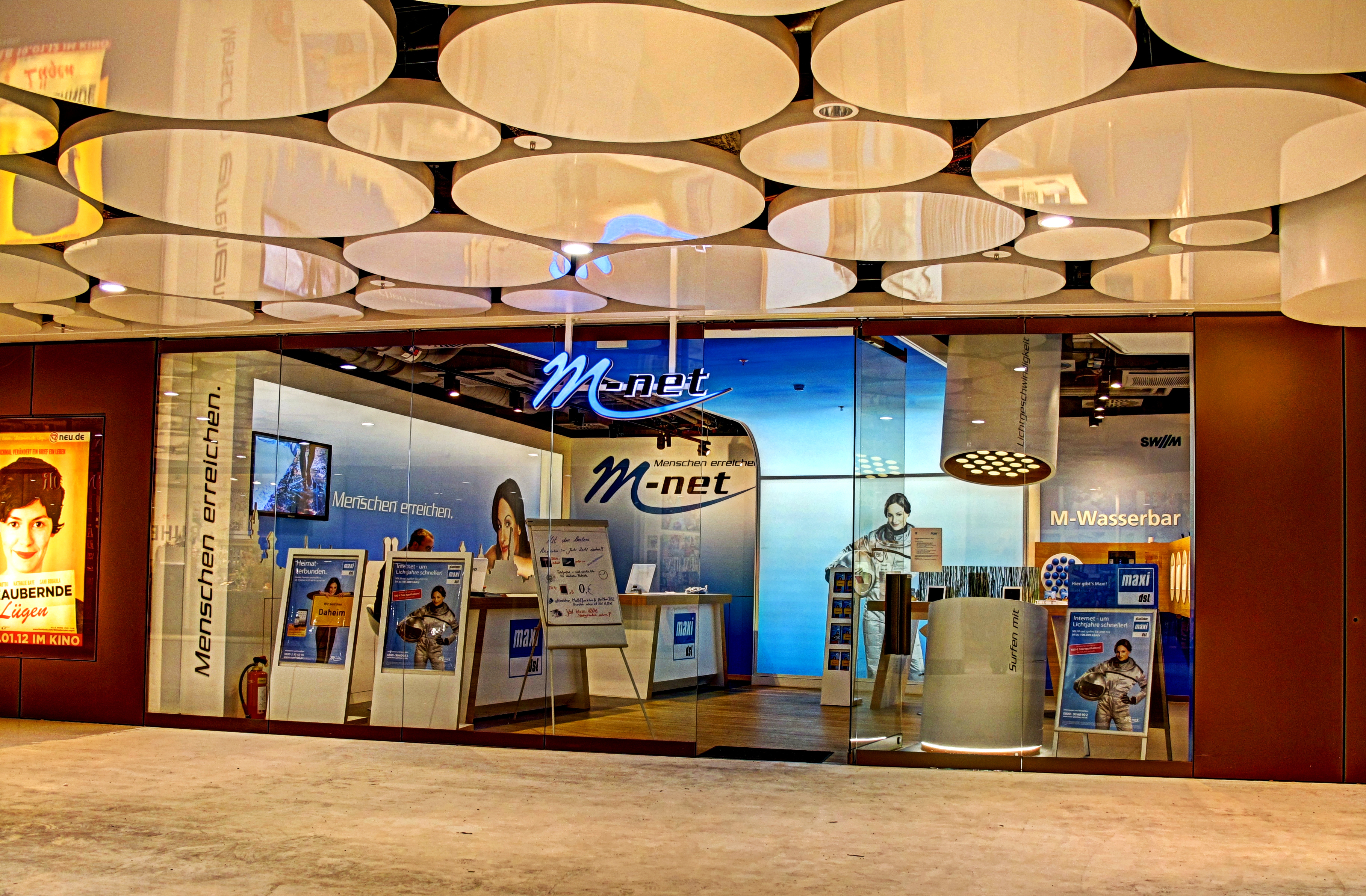 Deutschland, Bayern, Oberbayern, München, Innenstadt, Stachus bzw. Karlsplatz Untergeschoss, Ebene 1, Einkaufspassage, Filiale von M-Net